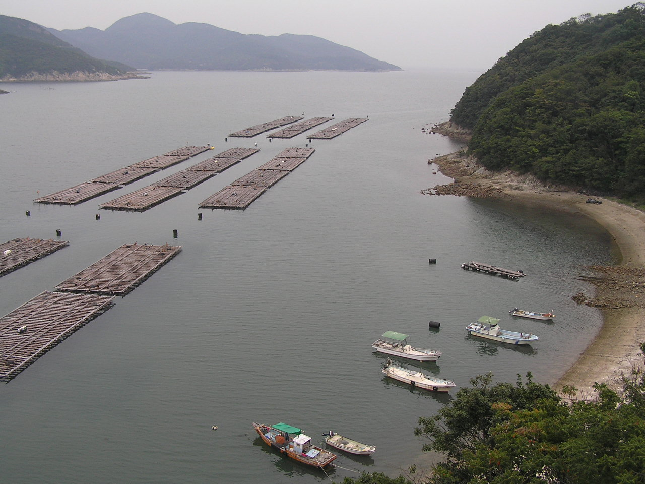 Kashira island in Bizen, Okayama,Japan 岡山県備前市日生町日生,頭島 カキ養殖いかだ